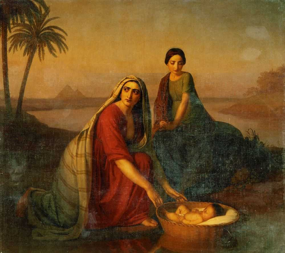 Моисей, опускаемый матерью на воды Нила. 1839-1842